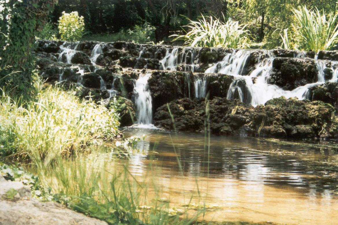 Cascadas del río Piedra en las cercanías del Monasterio de Piedra. Parque Natural del Monasterio de Piedra, Provincia de Zaragoza, Aragón. Autor: Fev. Junio 2002.